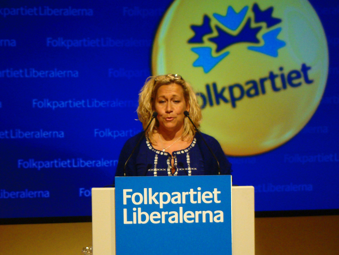 Helene Odenjung politik folkpartiet liberalerna göteborg landsmöte 2009